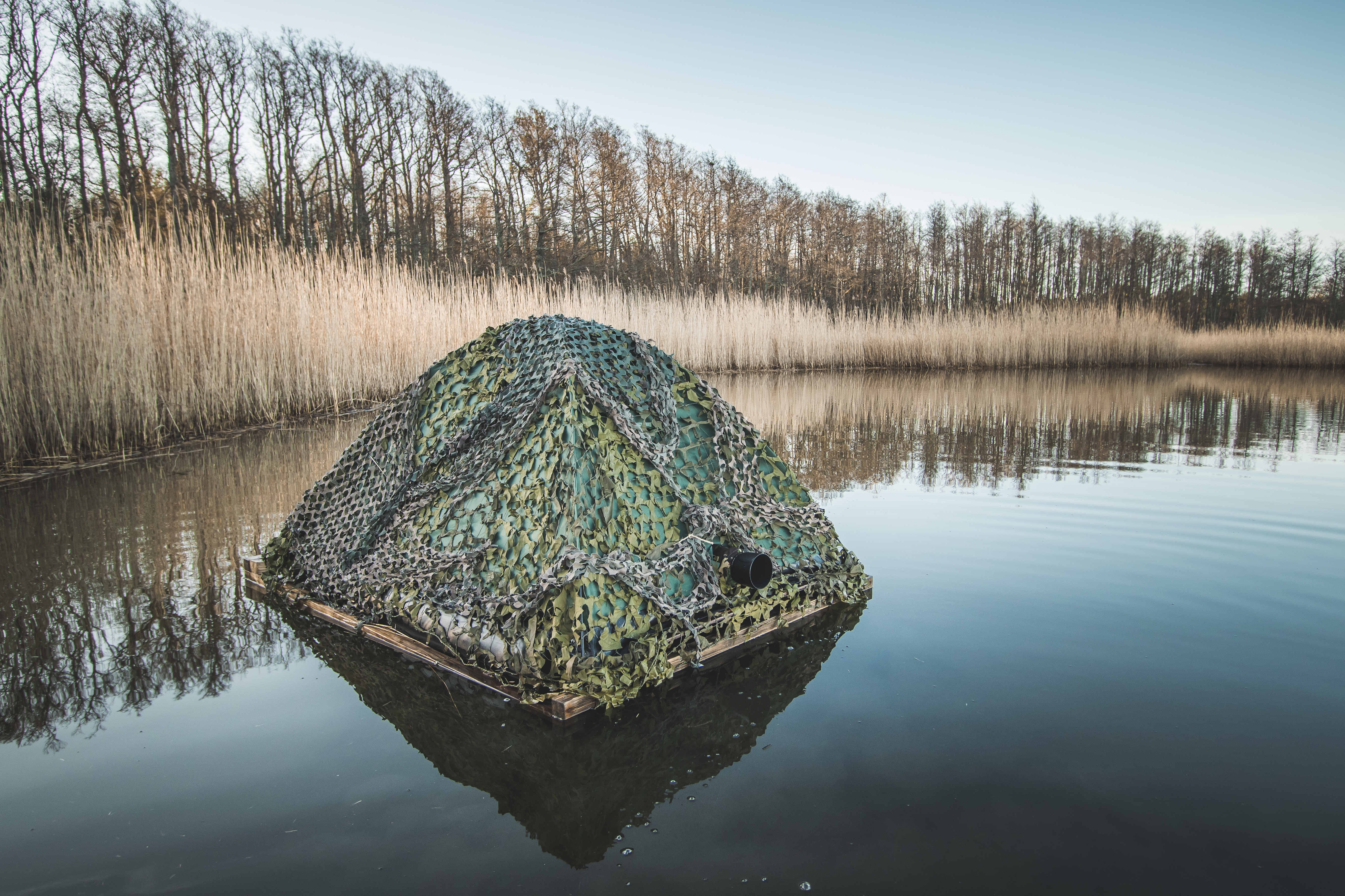 Veelindude pildistamiseks mõeldud ujuv fotovarje Saaremaal